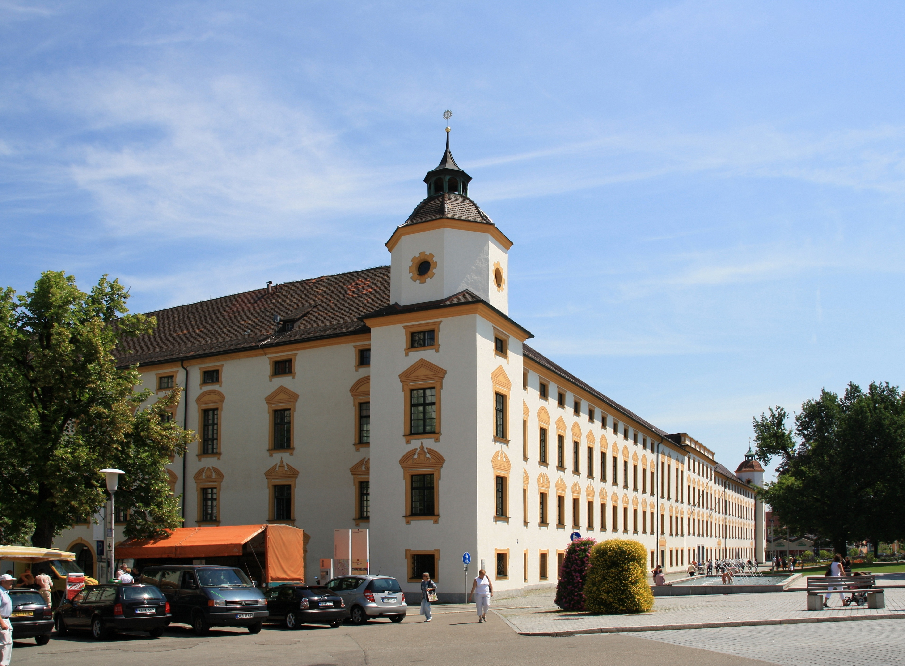 Kloster/Fürststift in Kempten (Allgäu)